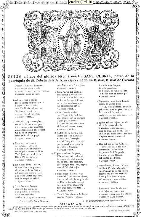 Ilustració del goig de Sant Cebrià dels Alls amb tota la seva lletra